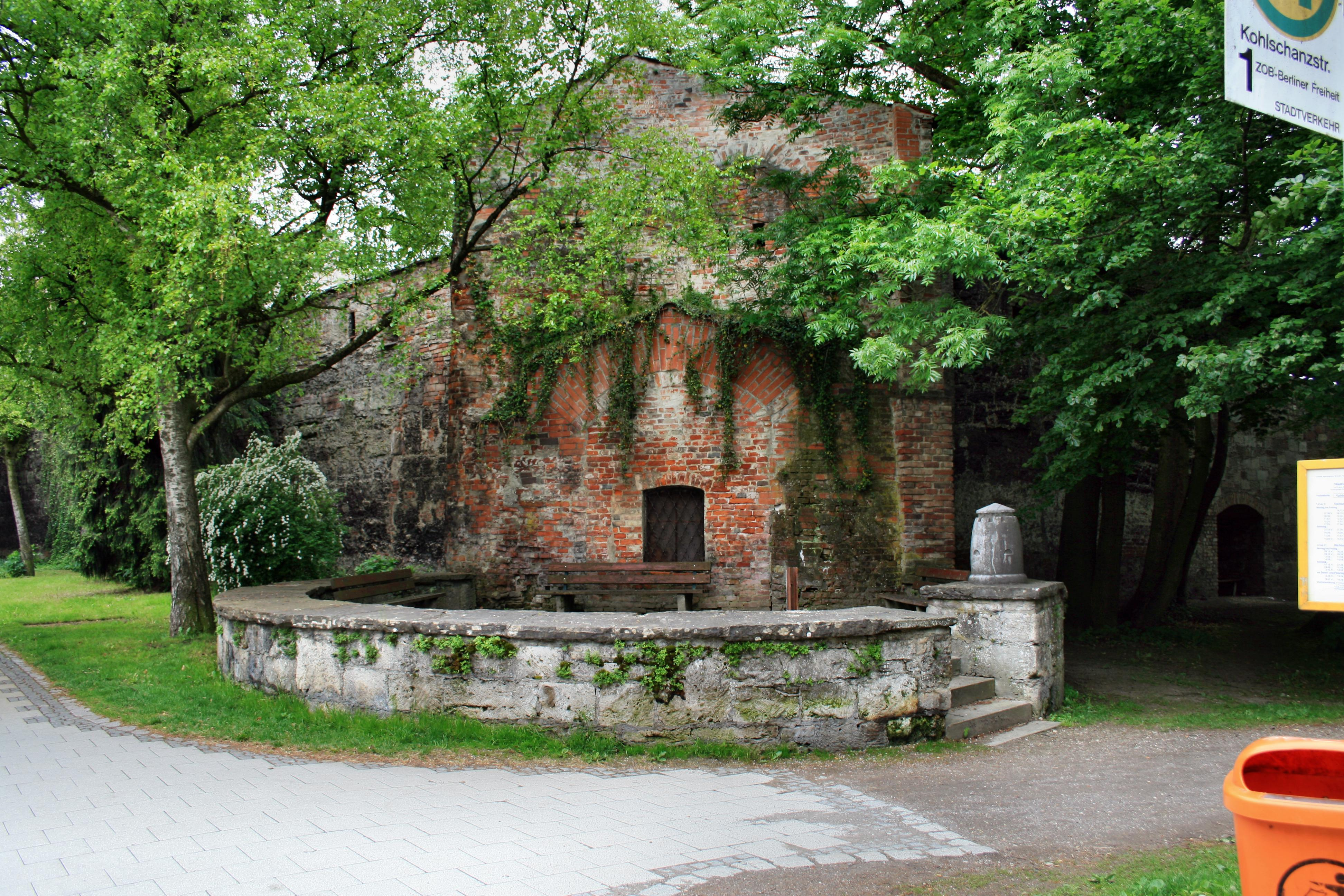 Ehemaliger Hafendeckelturm aus dem 14. Jahrhundert, 1805 auf Befehl Napoleons geschliffen. Rechts eine Skulptur des ehemaligen Turms. Das Rondell entspricht den Maßen des Turms.